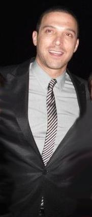 empresa